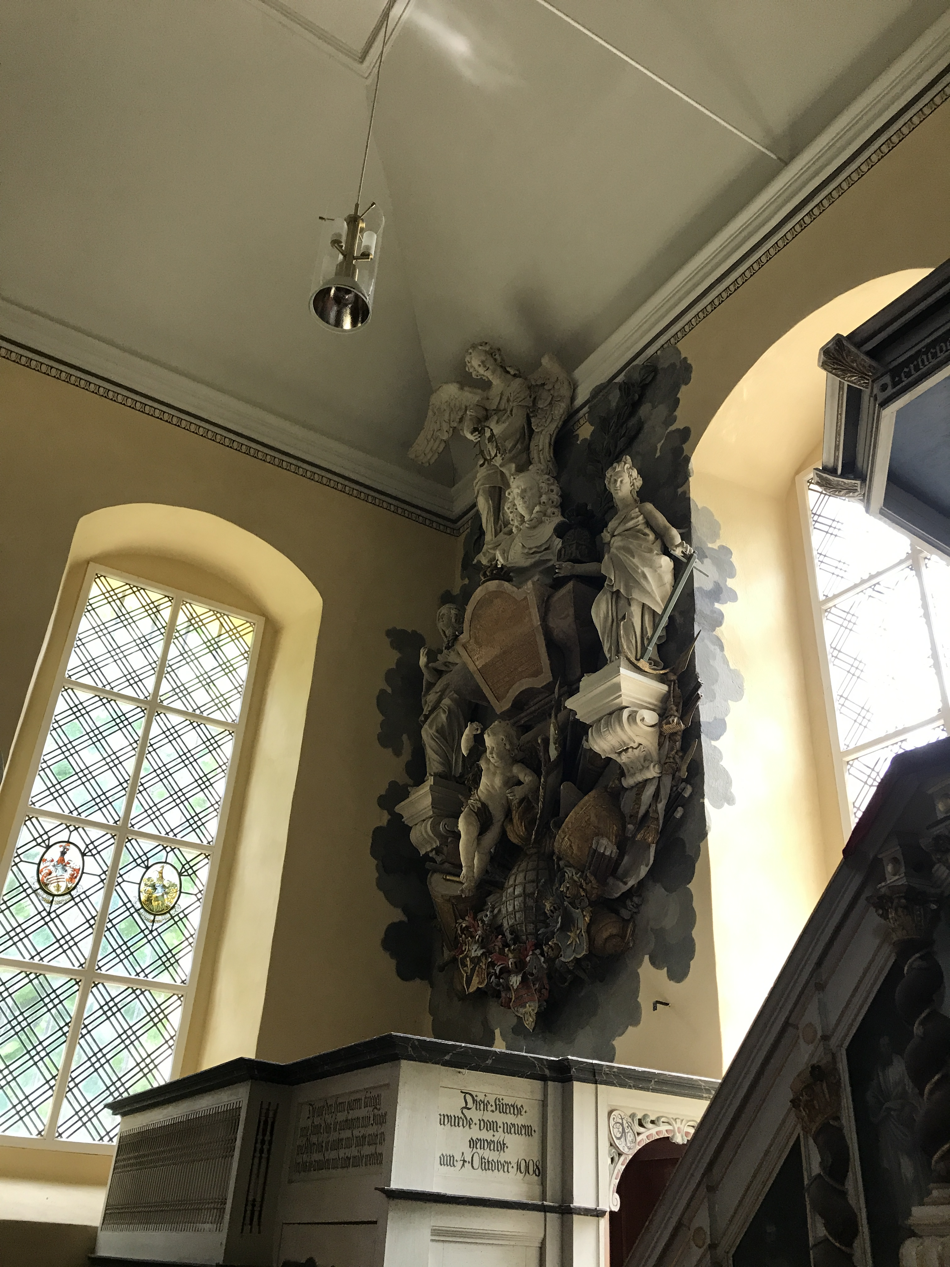 Die Dorfkirche Ahlsdorf ist eine Feldsteinkirche aus dem 14. Jahrhundert in Ahlsdorf, einem Ortsteil der Kleinstadt Schönewalde im Landkreis Elbe-Elster. Der Innenraum ist reich ausgestattet.